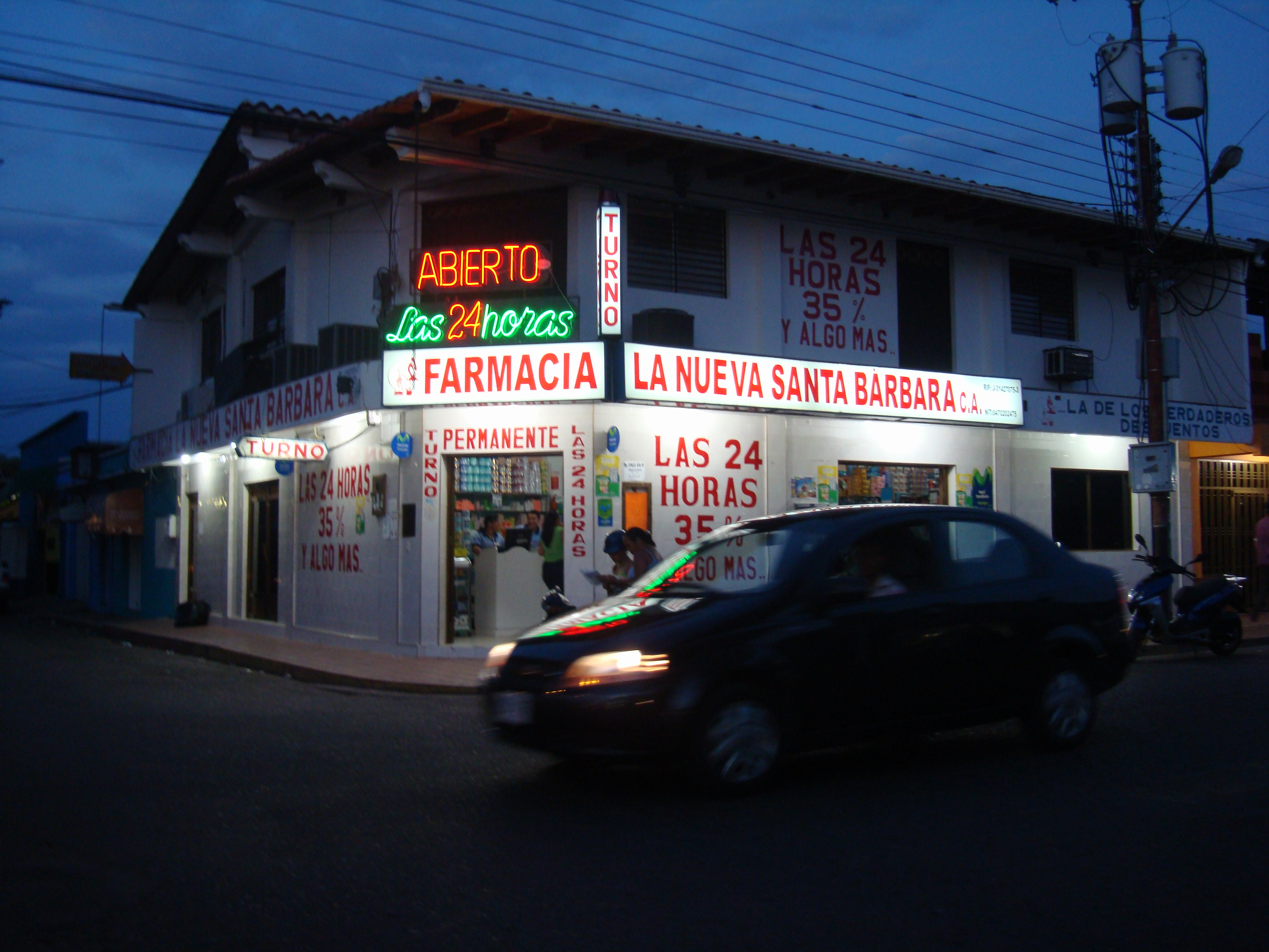 Farmacia S/B